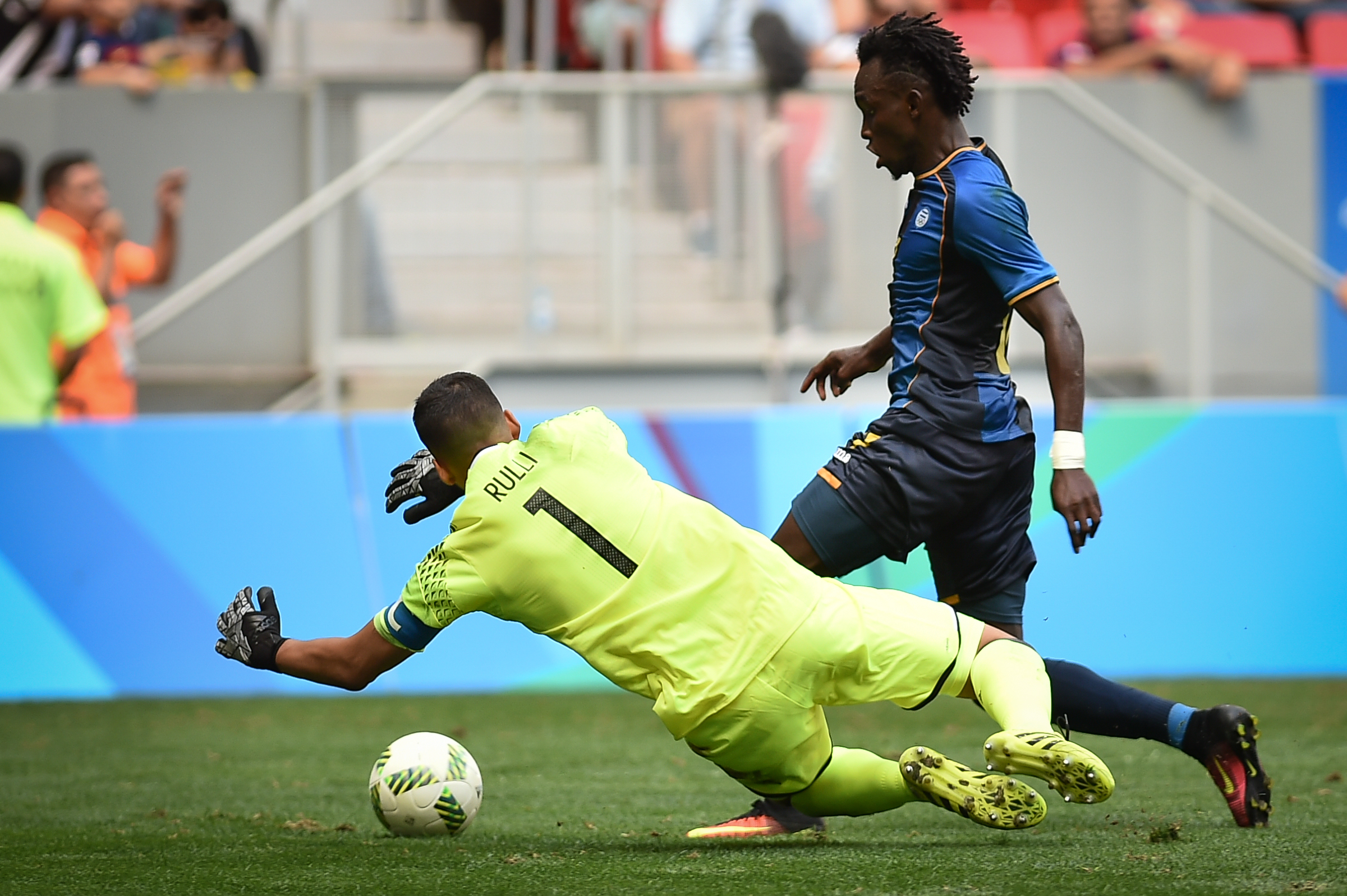 Estádio Nacional de Brasília Mané Garrincha, Brasília, DF, Brasil, 10/8/2016 Foto: Andre Borges/Agência Brasília Argentina e Honduras jogam nesta quarta-feira (10), no Estádio Mané Garrincha, pelo grupo D do futebol masculino nas Olimpíadas 2016.